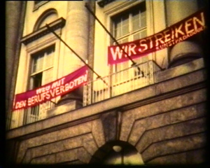 Streik der Berliner Hoch- und Fachschulen 1976/77